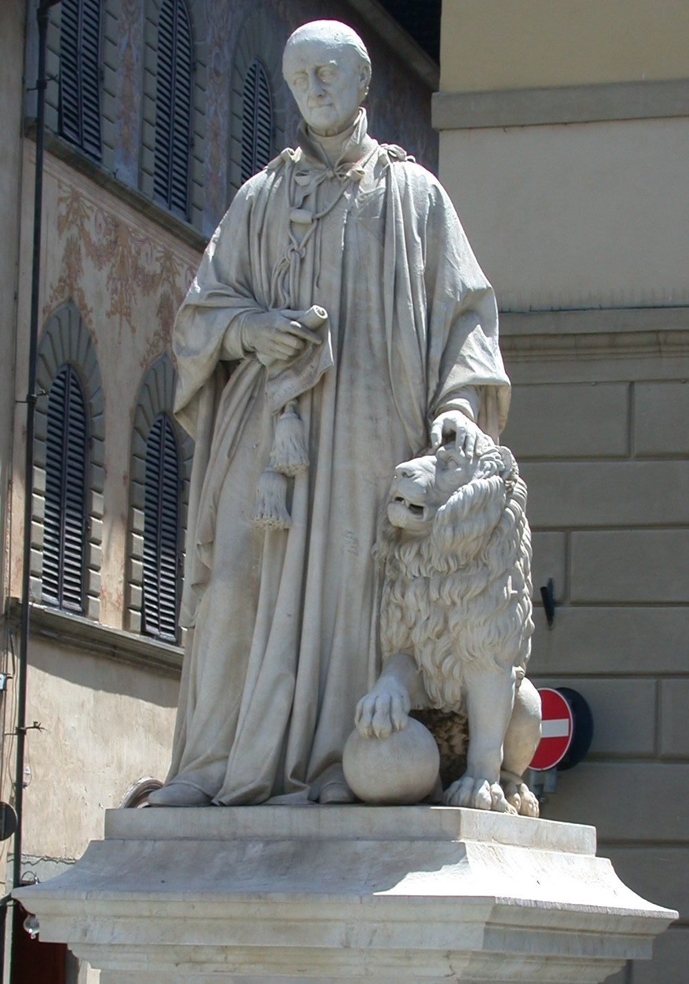 La statua di Vittorio Fossombroni ad Arezzo.